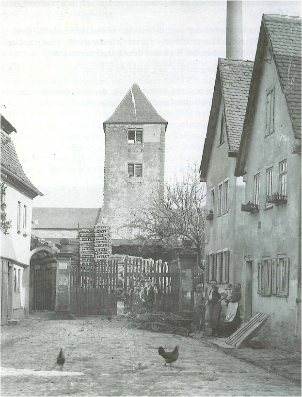 datiertes Foto des Wörther Stadtschlosses von unbekannter Hand, um 1910; Ursprüngliches Ausehen mit Zeltdach